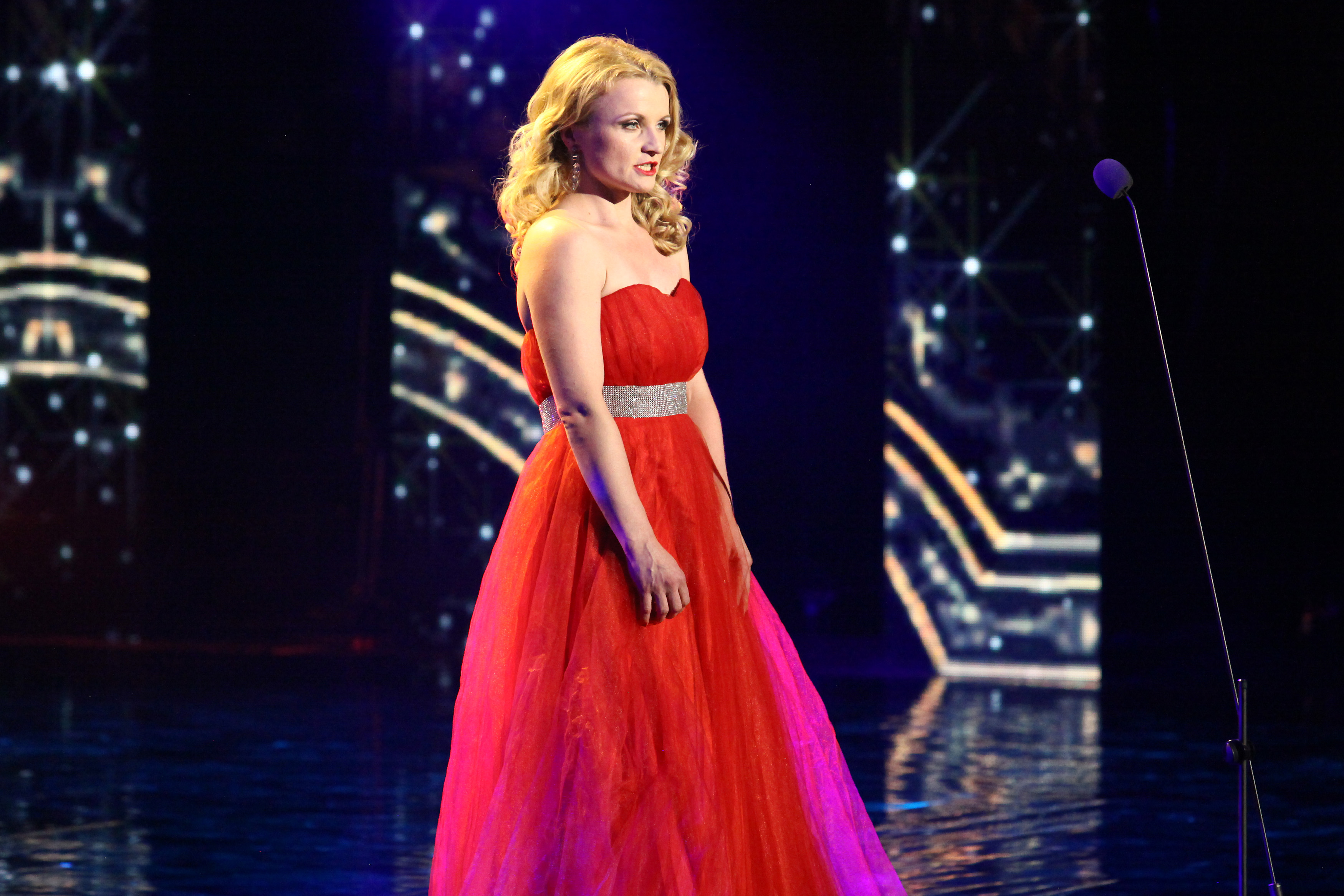 Photo: Andrej Klizan